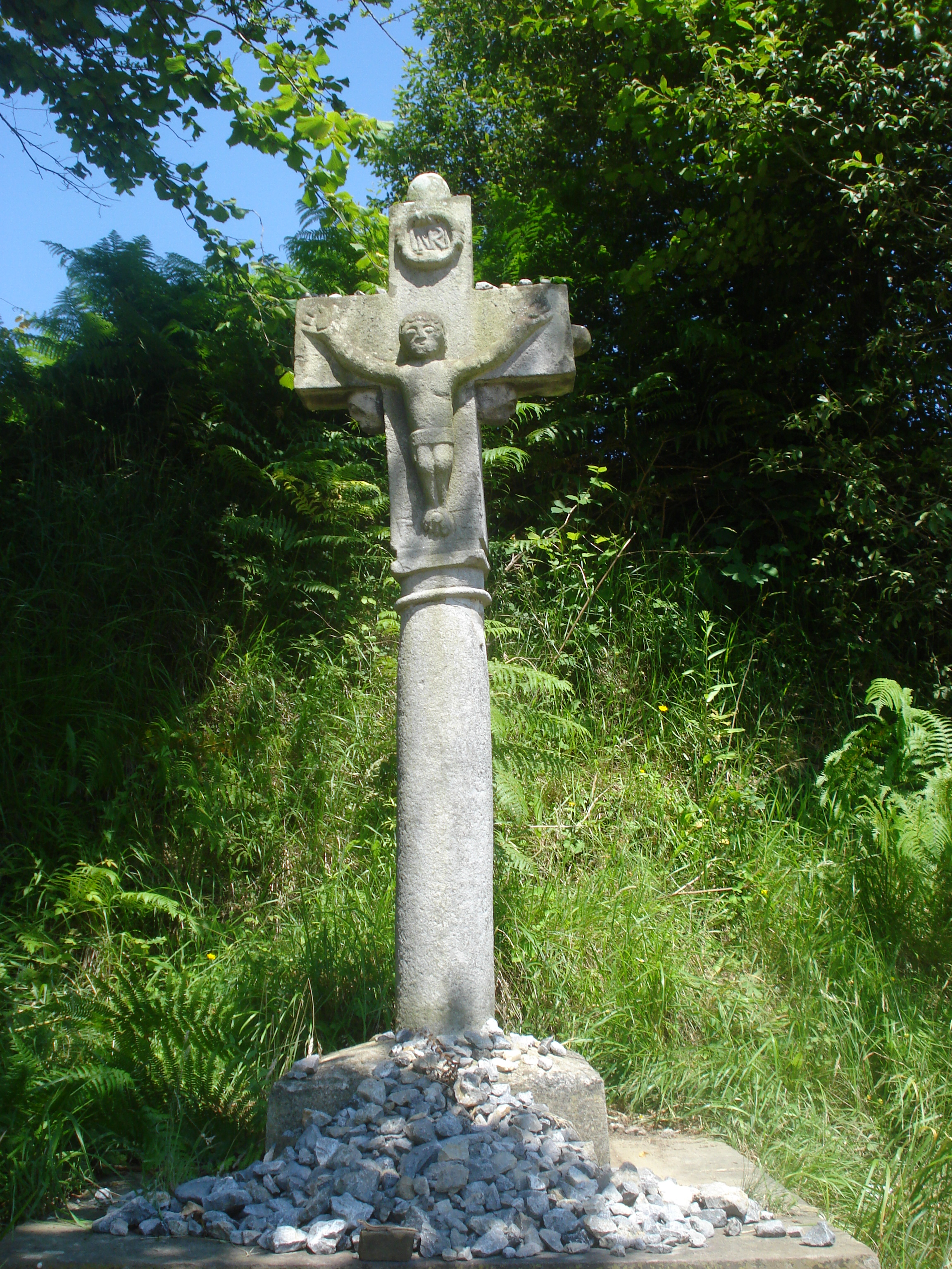 Ostabat (Pyrénées-Atlantiques 64, Fr), Croix sculptée avec coquille.JPG